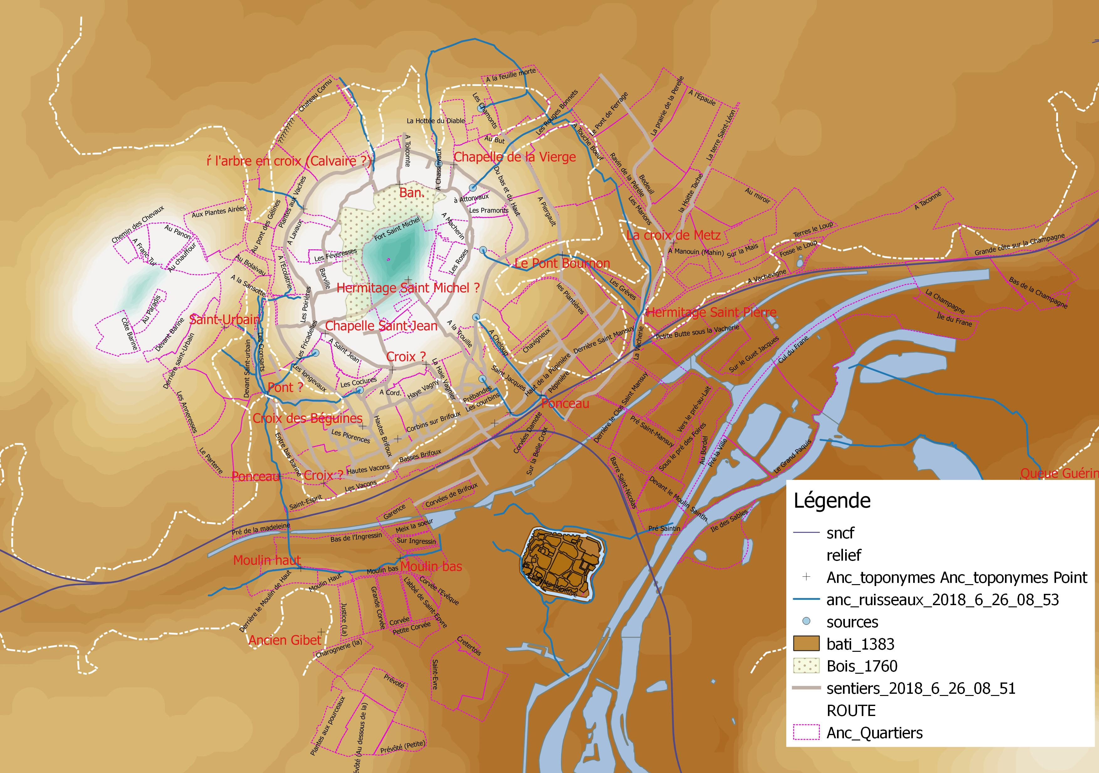 Carte de toponymes au tour de la ville de Toul (réalisation avec Qgis)